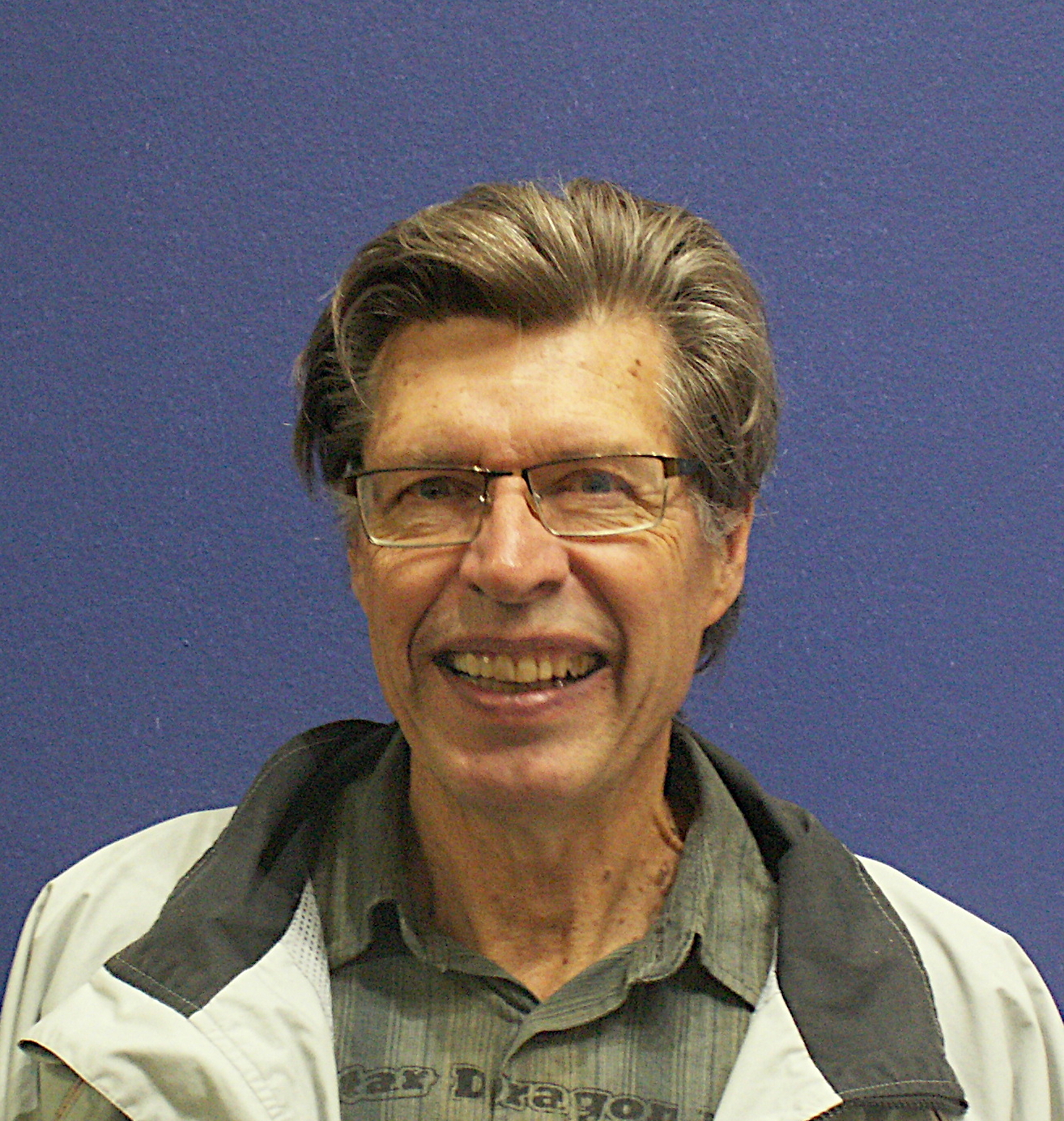 Ulf Rönner (född Ulf Nilsson) på Bokmässan 2017.